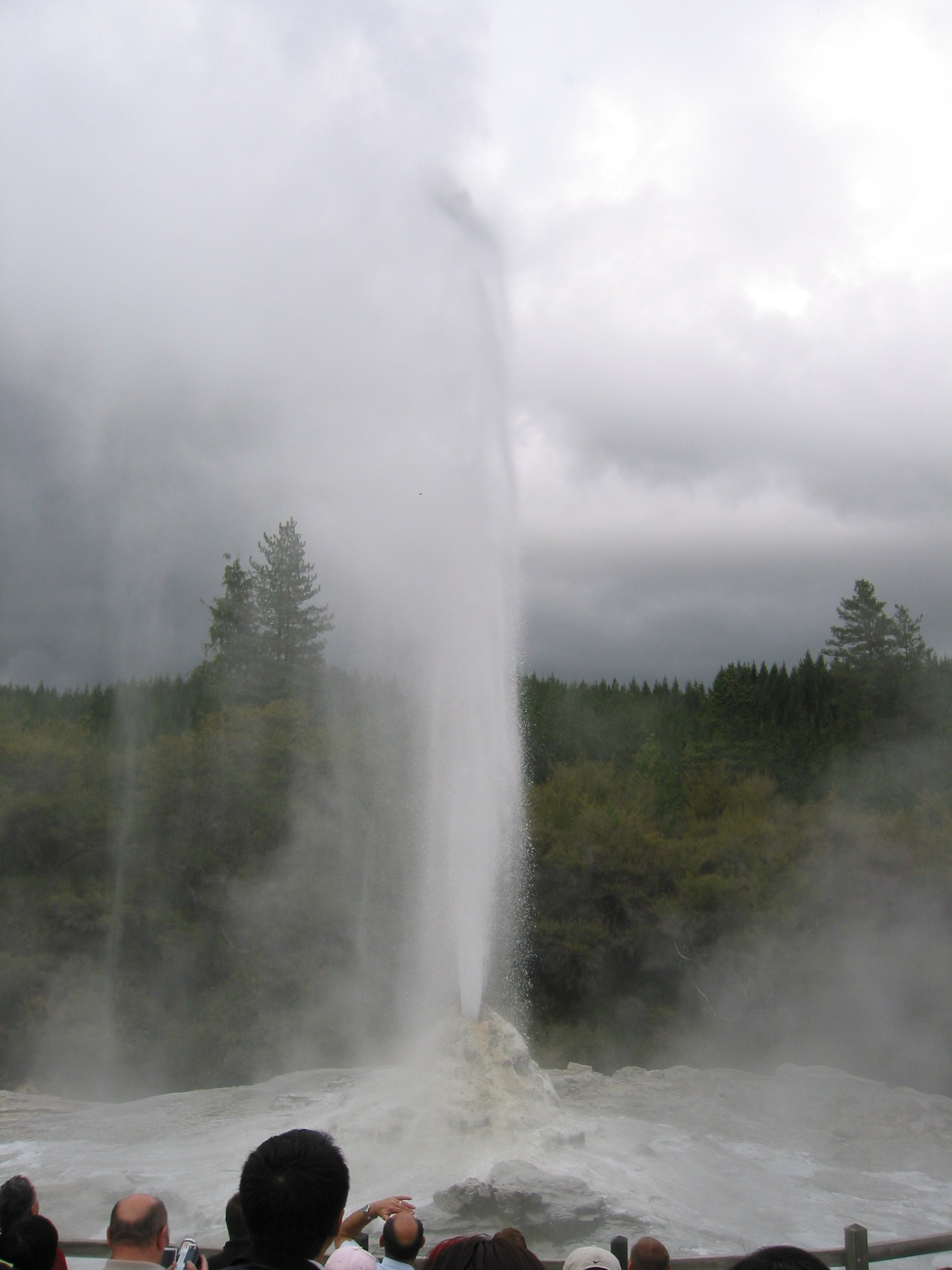 Eigen foto genomen tijdens tour door Nieuw-Zeeland